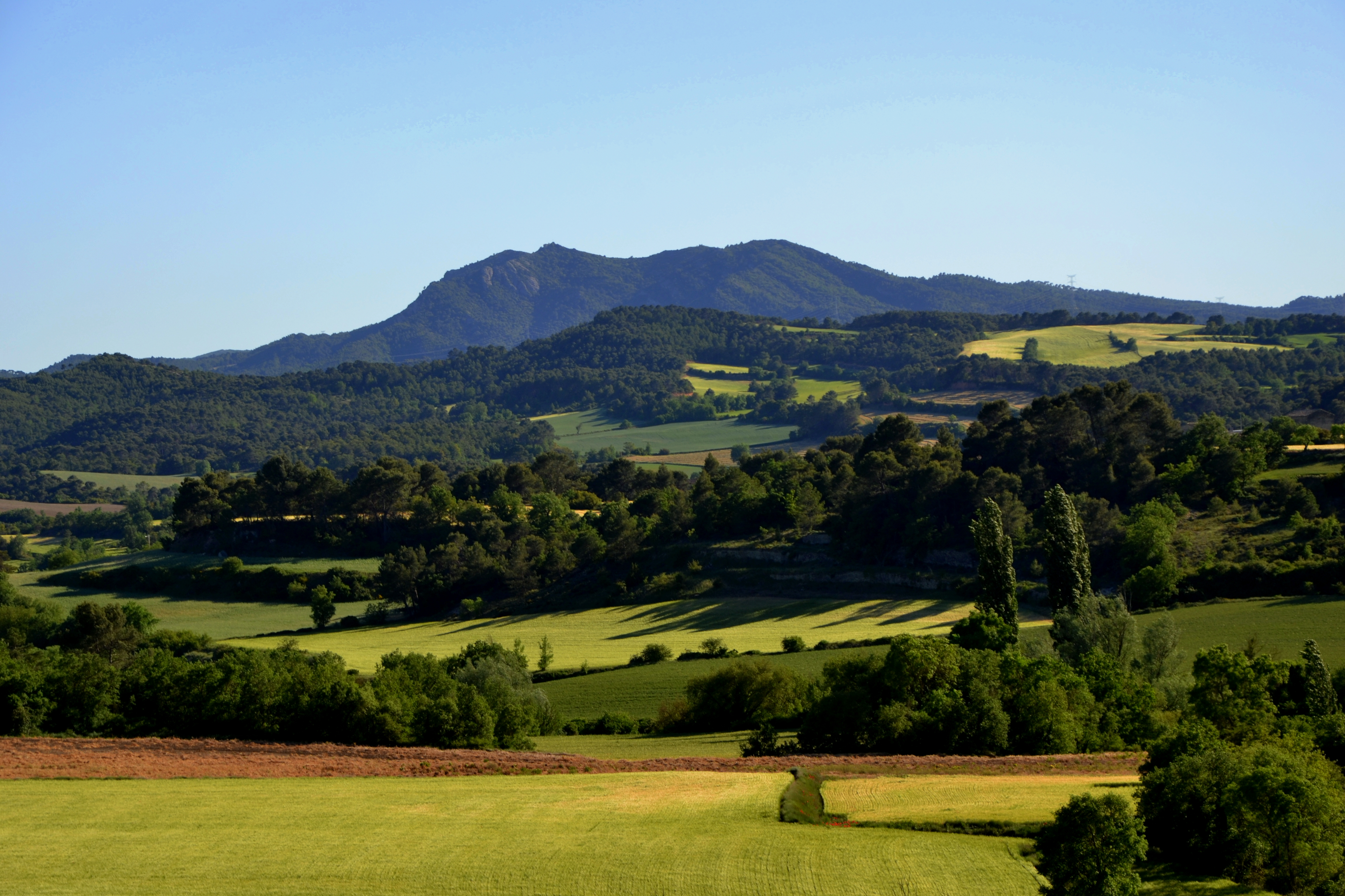 Santa Coloma de Queralt, al fons Sant Miquel de Montclar